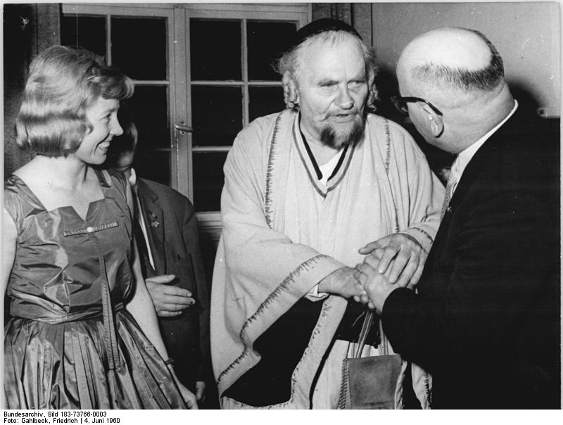 Zentralbild Gahlbeck 6.6.1960 II. Arbeiterfestspiele des FDGB im Bezirk Karl-Marx-Stadt Einen der Höhepunkte des Eröffnungstages der II. Arbeiterfestspiele in Karl-Marx-Stadt am 4.6.1960 bildete die Aufführung von G.E. Lessings "Nathan der Weise" mit Nationalpreisträger Eduard von Winterstein in der Titelrolle. UBz.: Eine Delegation aus dem VEB Getriebewerk Karl-Marx-Stadt bedankt sich bei Eduard von Winterstein nach der Vorstellung für die großartige Darstellung des "Nathan". Rechts der BGL-Vorsitzende Edmund Müller, links Isolde Joachim und (fast verdeckt) der Parteisekretär Werner Fritz.